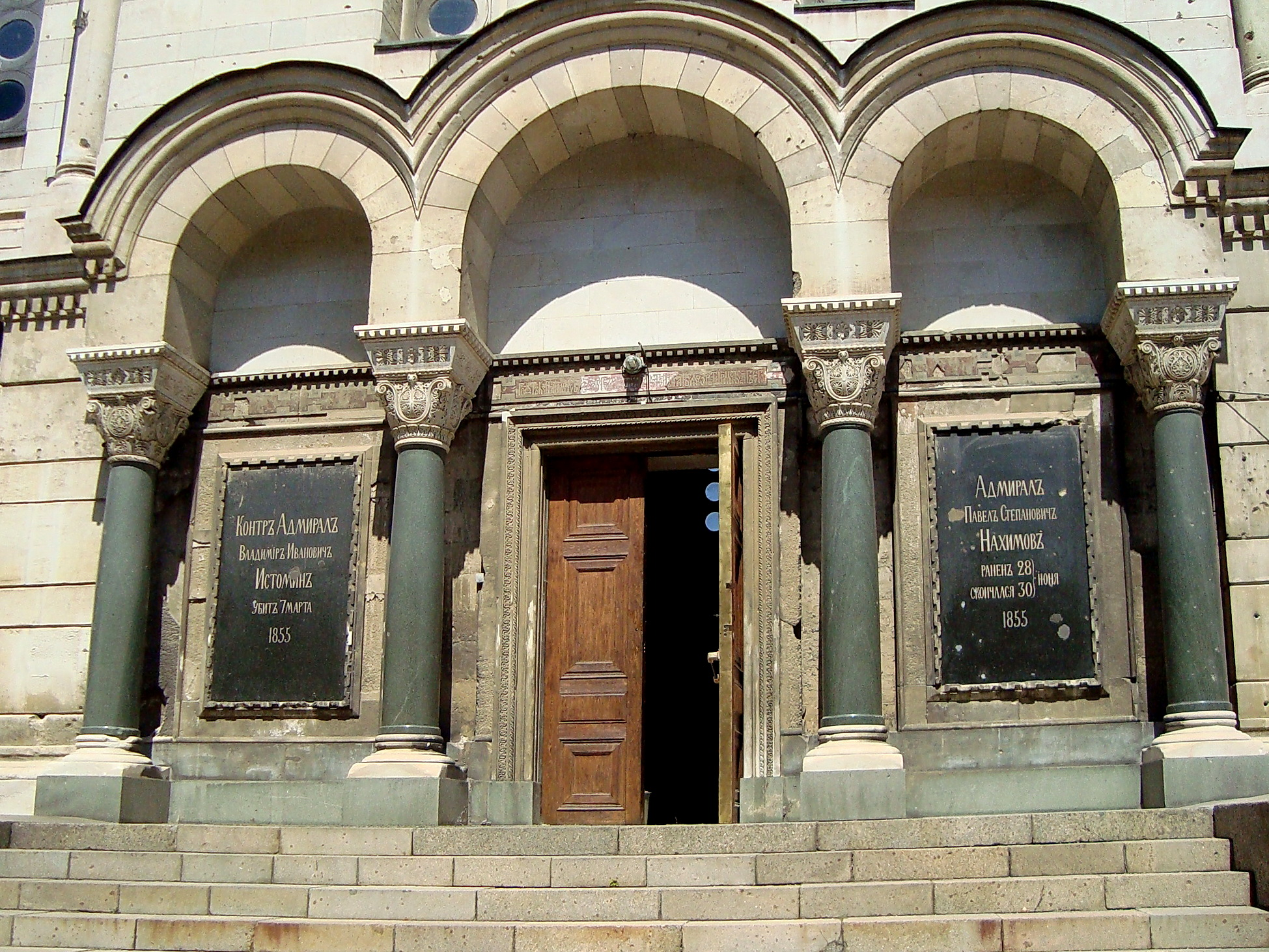 Склеп-усипальня адміралів, Севастополь, пл. Леніна